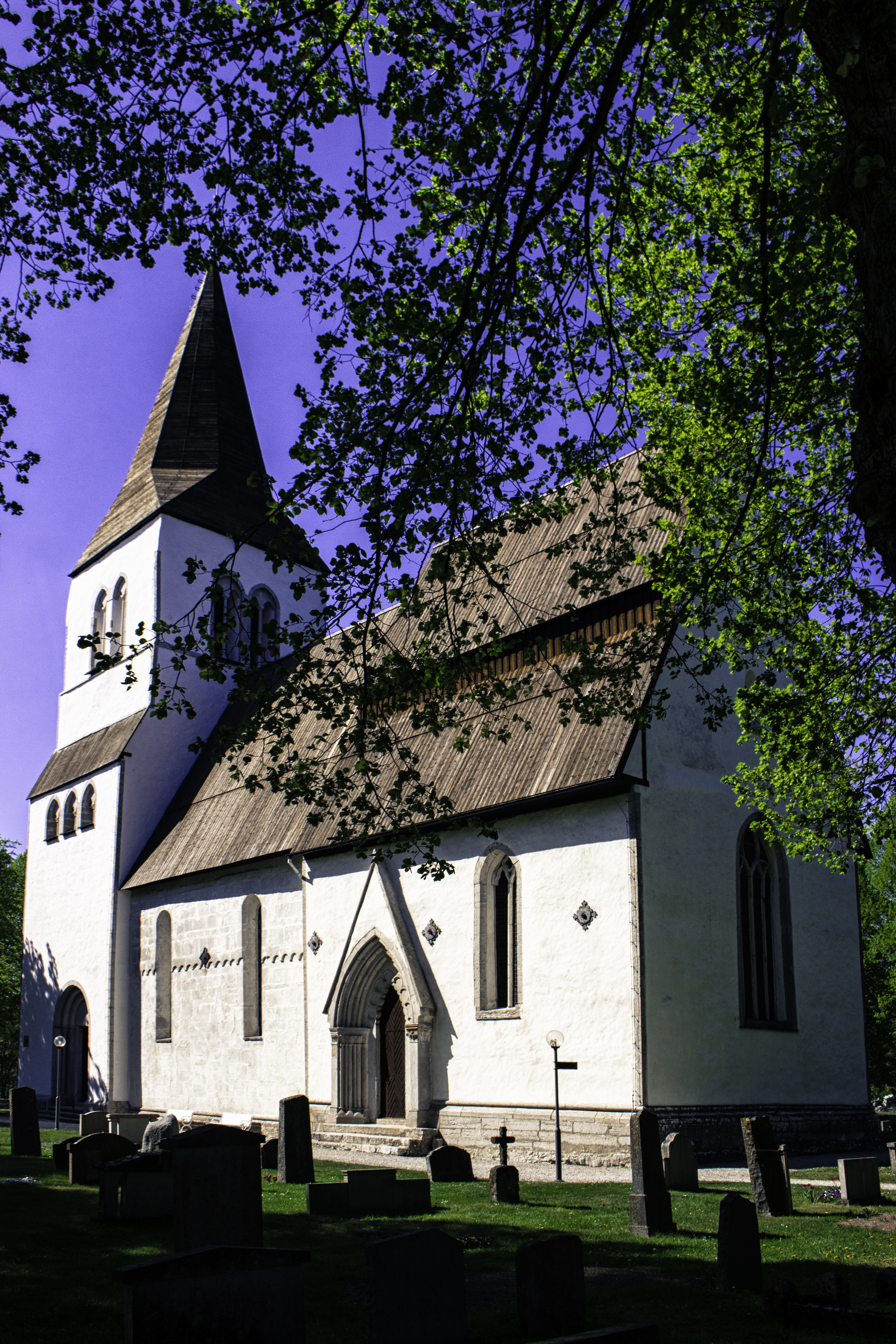 Igrexa de Eskelhem, na illa sueca de Gotland.